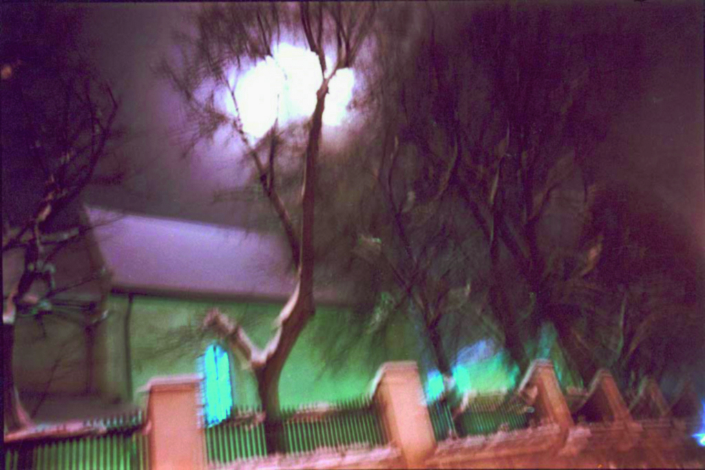 Nadia Rovderova´s picture.